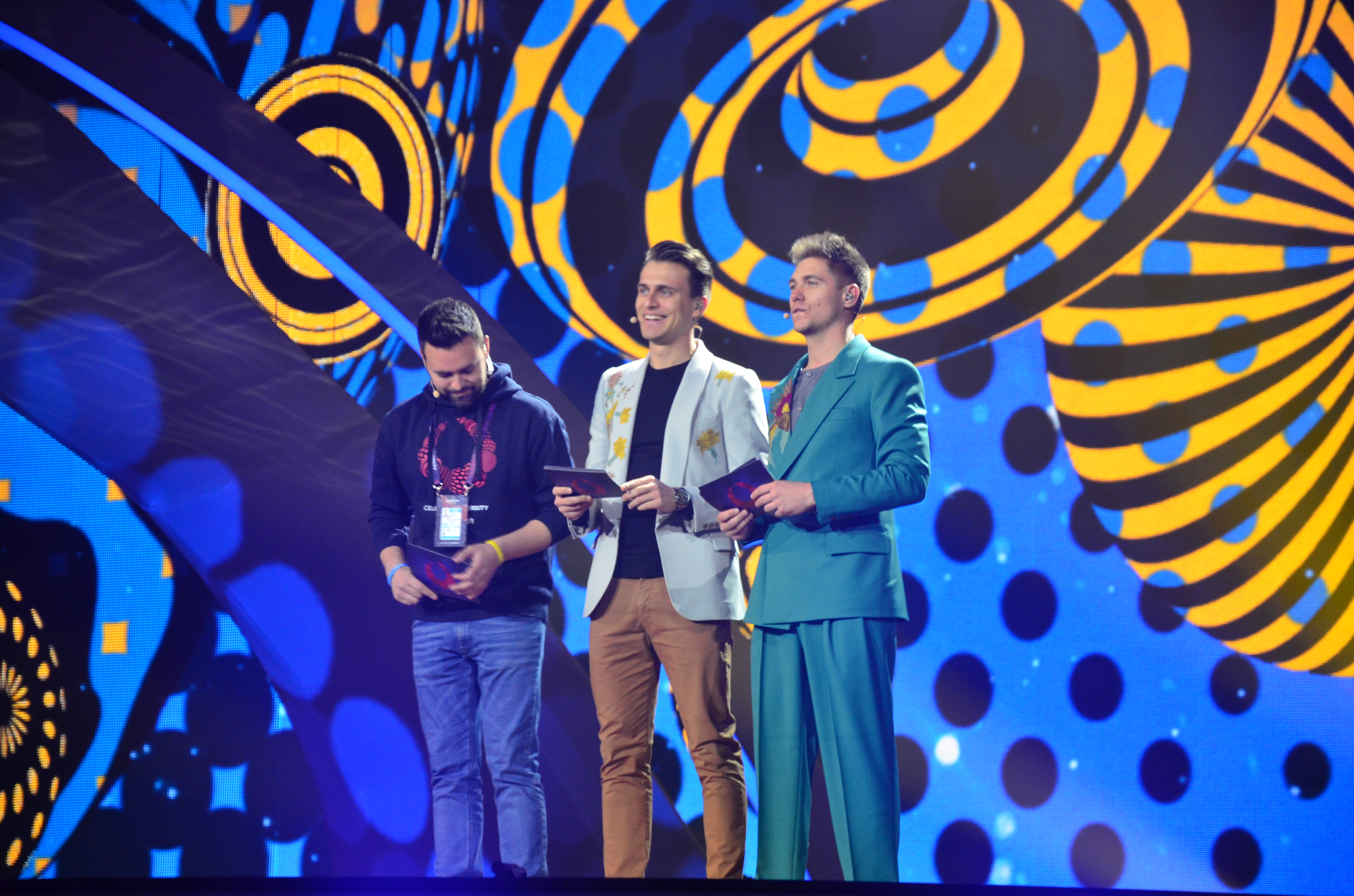 10 травня 2017 року у Києві відбулась генеральна репетиція 2 півфіналу "Євробачення".